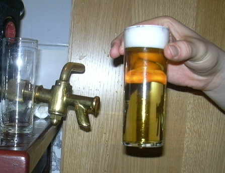 Beschreibung: Kölsch (Bier) Fotograf: Trexer, User:Trexer Aufgenommen: 2004 mit ???